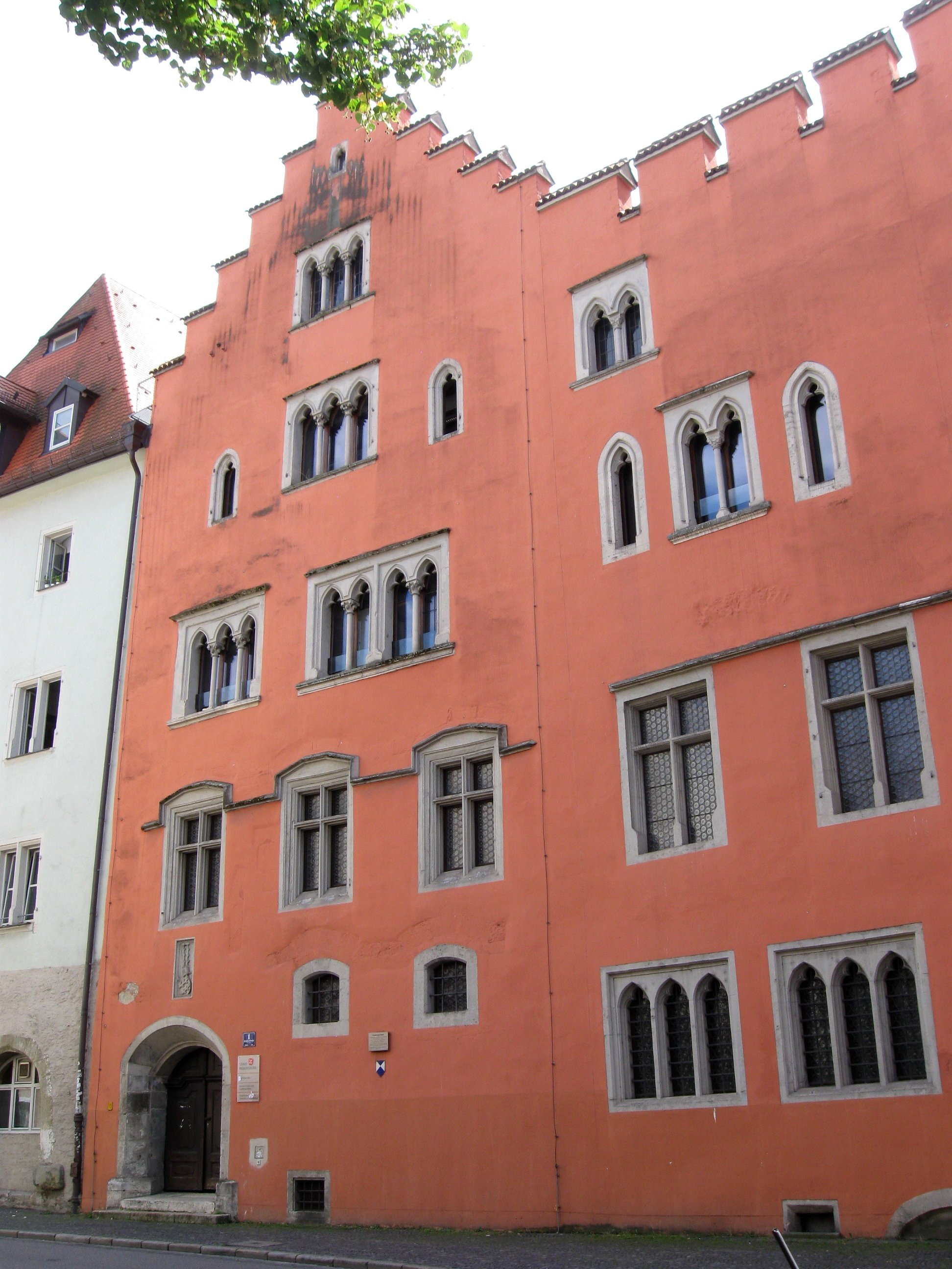 Baumhackergasse 6; Keplerstraße 1. Verwaltungsgebäude (Stadtarchiv), ehem. Patrizierburg Runtinger-Haus und Gasthaus zur goldenen Krone, viergeschossiger und giebelständiger Frackdachbau mit Treppengiebel und zinnenbekröntem Anbau und Gewölben im Erdgeschoss, gotischer Gebäudeflügel zwischen zwei Höfen, im Kern romanischer Turmbau, um 1200, um 1400 erweitert und neu ausgestattet, 1961-65 und 1971-77 saniert; Rückgebäude siehe Baumhackergasse 6.